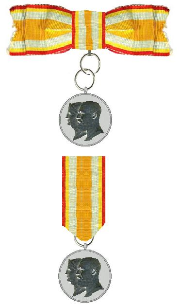 Huwelijksmedaille_1926_Nederland.